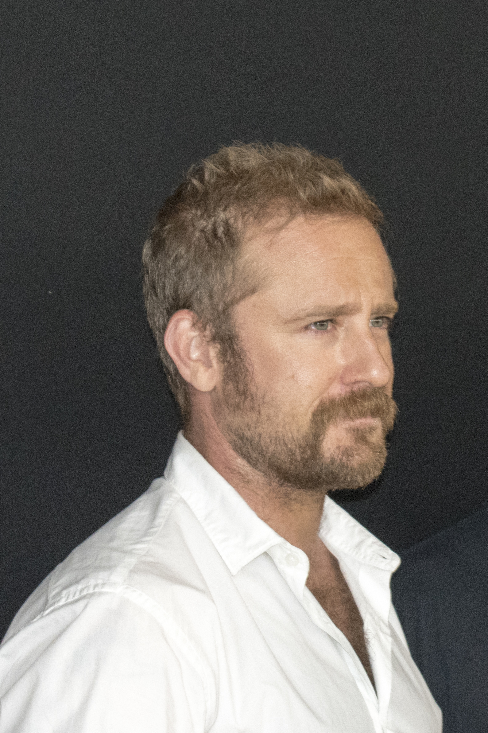 Novinářská konference 13. 9. 2018. Autor: Blanka Borová (Karolína Černá) pro Kritiky.cz